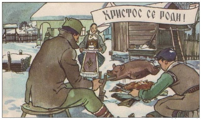 Туциндан. Сербская открытка.